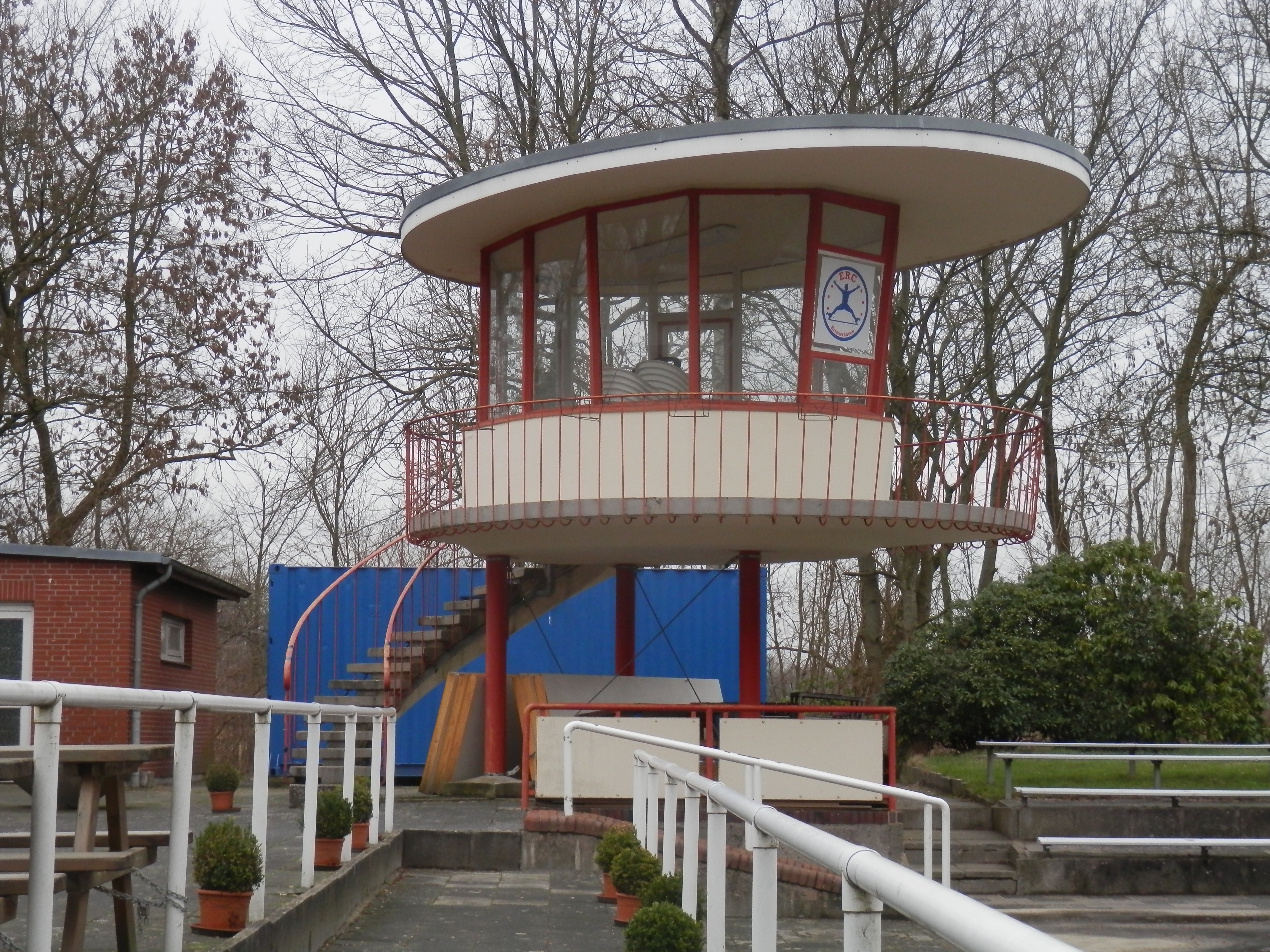 Rollschuhbahn Bremerhaven, Regieturm in Bremerhaven, In den Nedderwiesen 2 Das abgebildete Objekt ist ein geschütztes Kulturdenkmal in der Freien Hansestadt Bremen, mit der Nr. 3324 beim Landesamt für Denkmalpflege registriert.